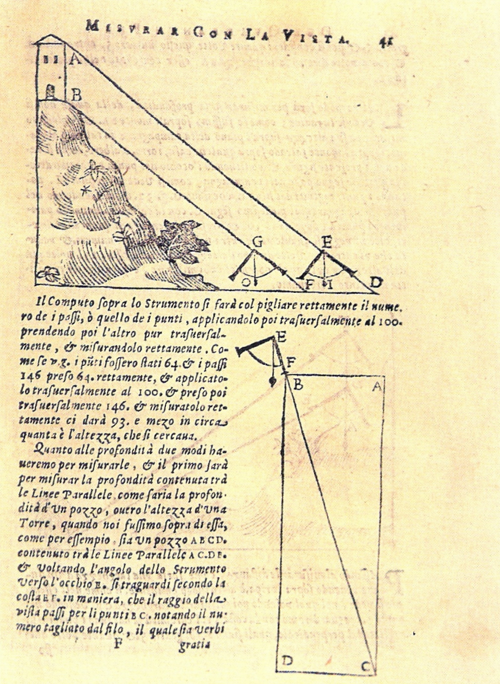 L' uso del compasso by Galileo Galilei published in Opere, Bologna, 1656.